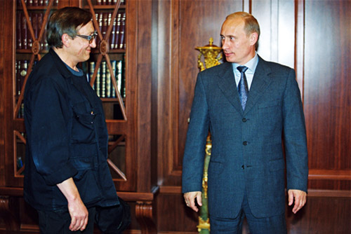 МОСКВА, КРЕМЛЬ. С художником и скульптором Михаилом Шемякиным.